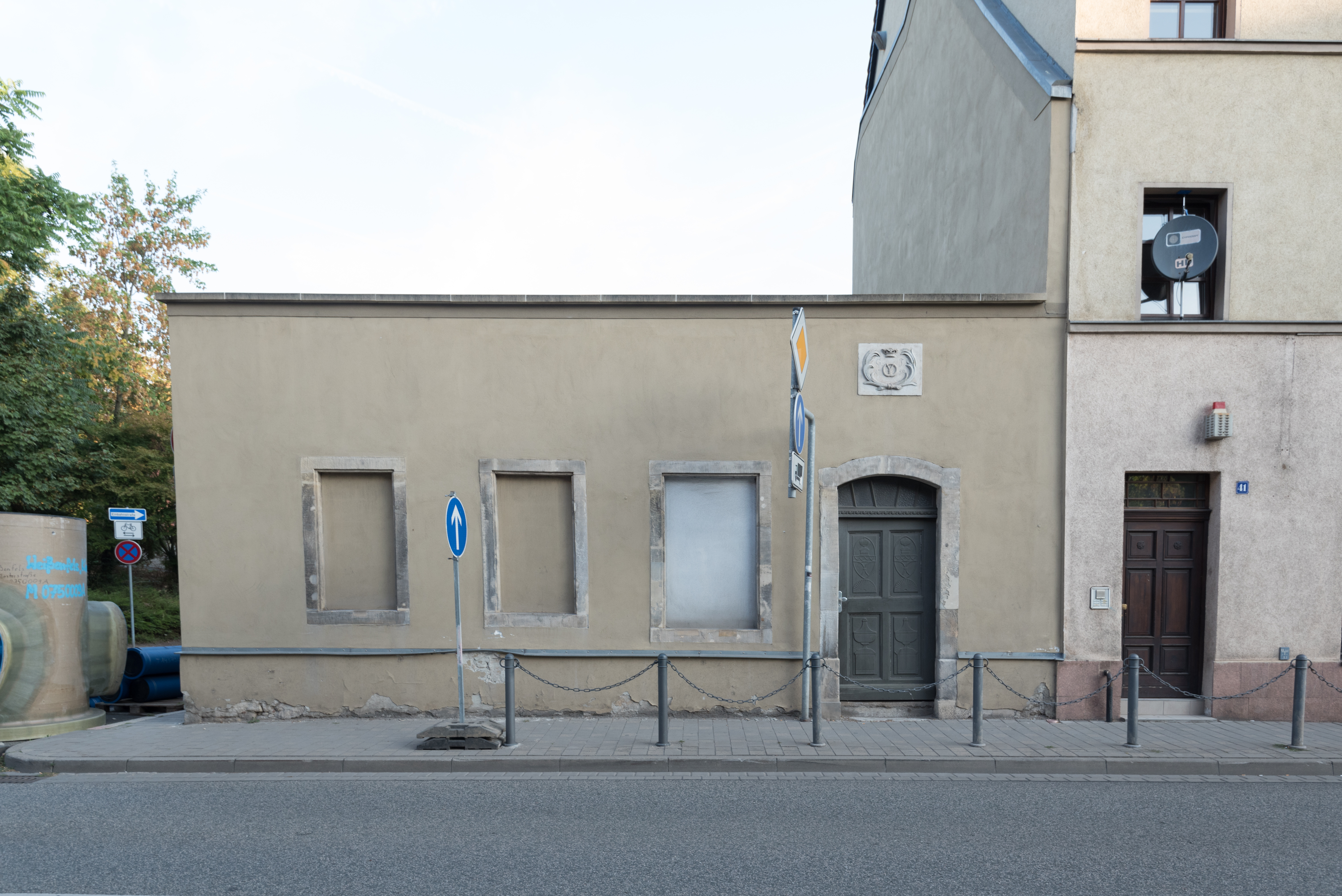 Weißenfels, Nikolaistraße 43